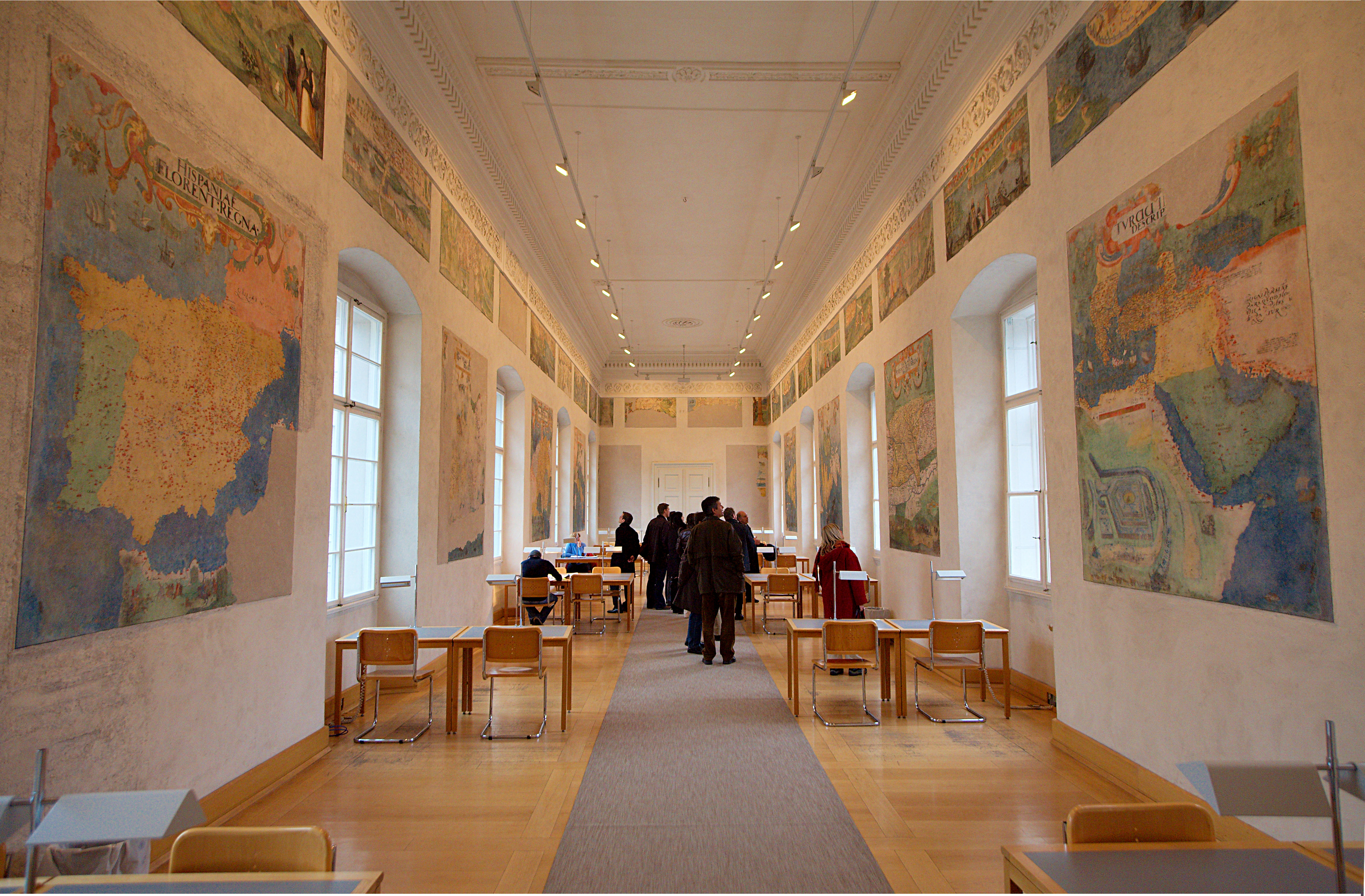 Salzburger Residenz, Toskanatrakt., jetzt Teil der Universitätsbibliothek